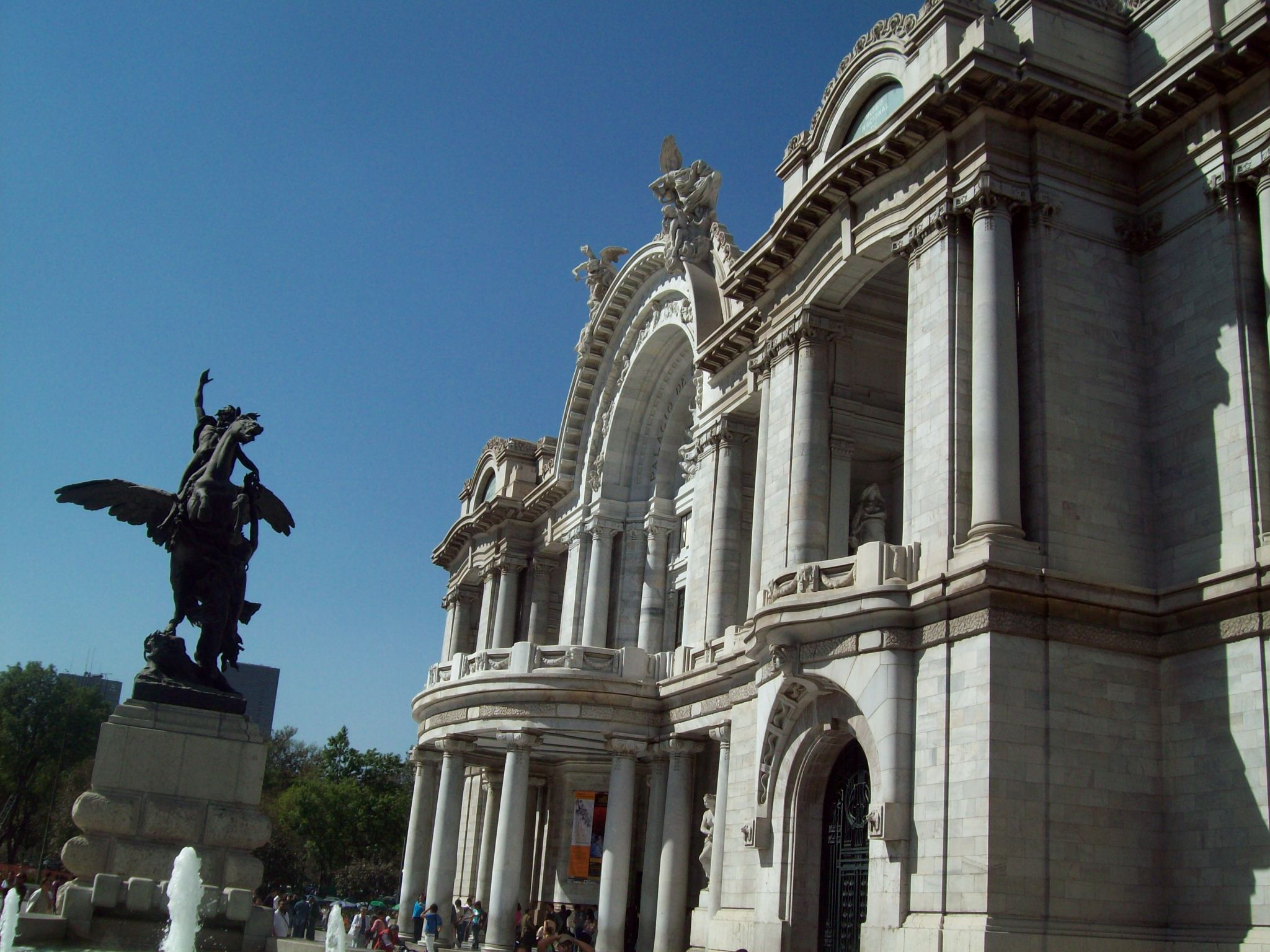 El Palacio de Bellas Artes, ubicado en el Centro Histórico de la Ciudad de México, es la casa máxima de la expresión de la cultura del país, considerado el teatro lírico más relevante de México, y el centro más importante dedicado a las bellas artes en todas sus manifestaciones.